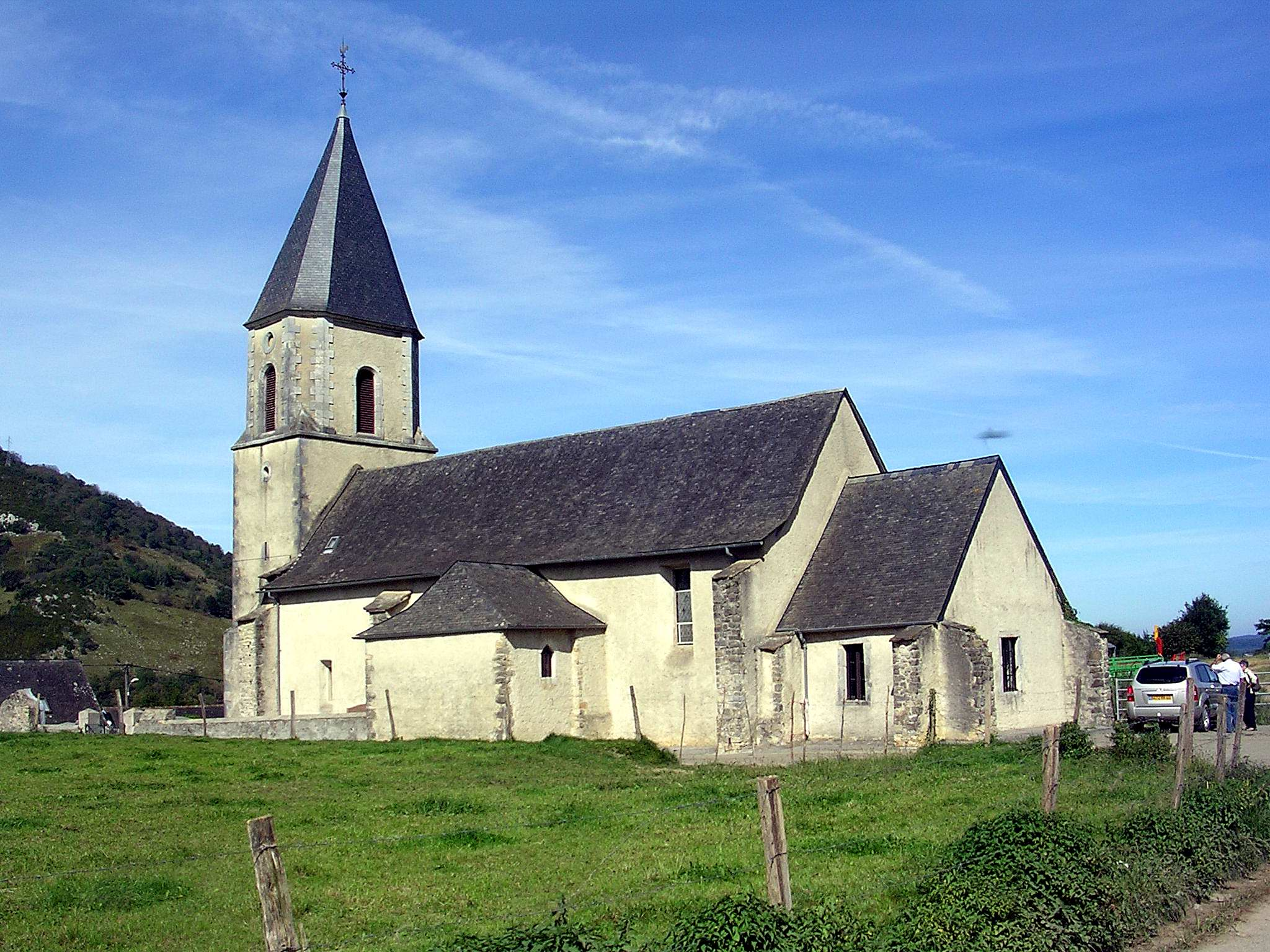 Lurbe-Saint-Christau, église paroissiale